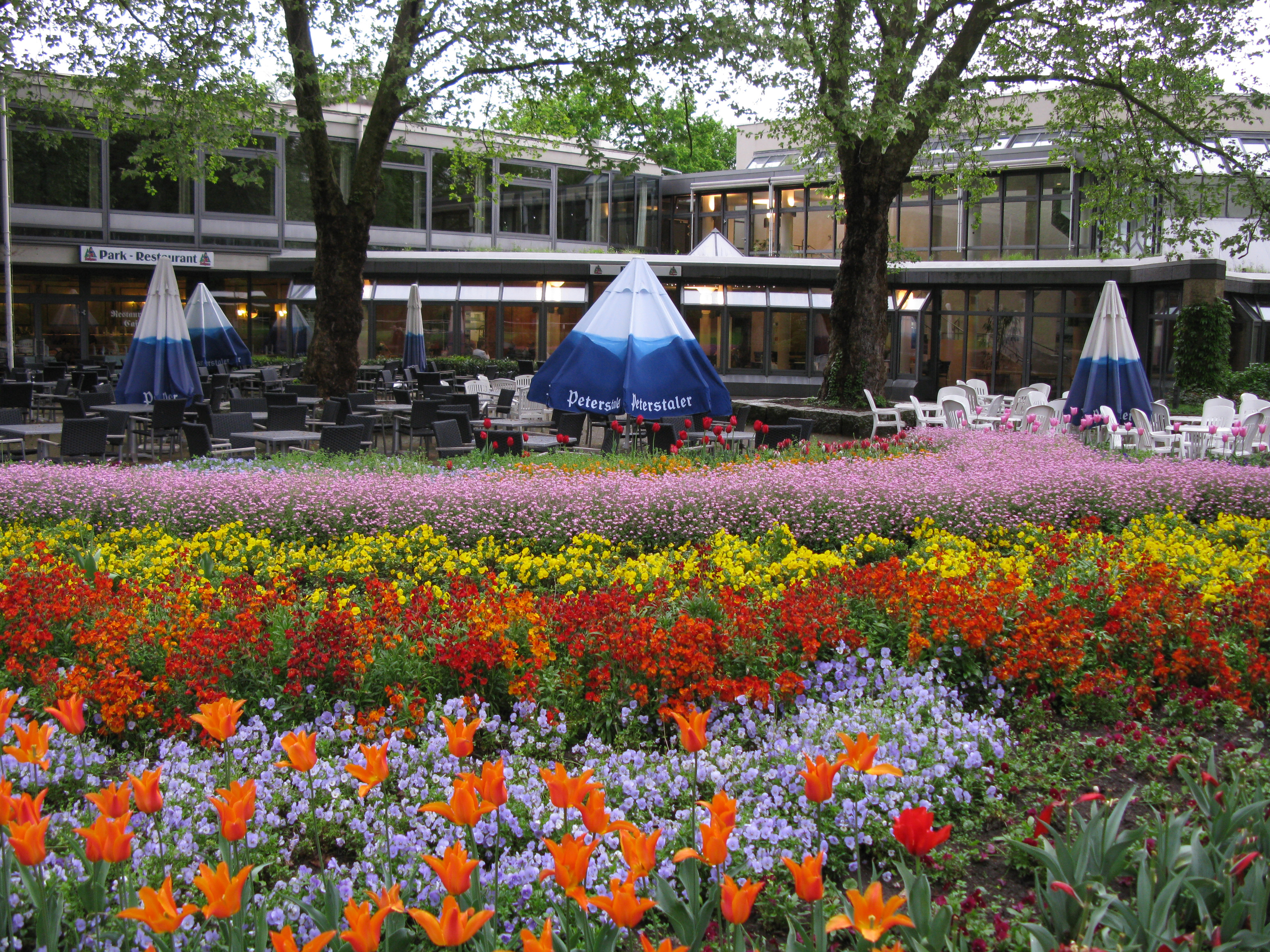 Kurpark Bad Krozingen mit Kurhausrestaurant im von Horst Linde entworfenem und 1959 eröffnetem Kurhaus